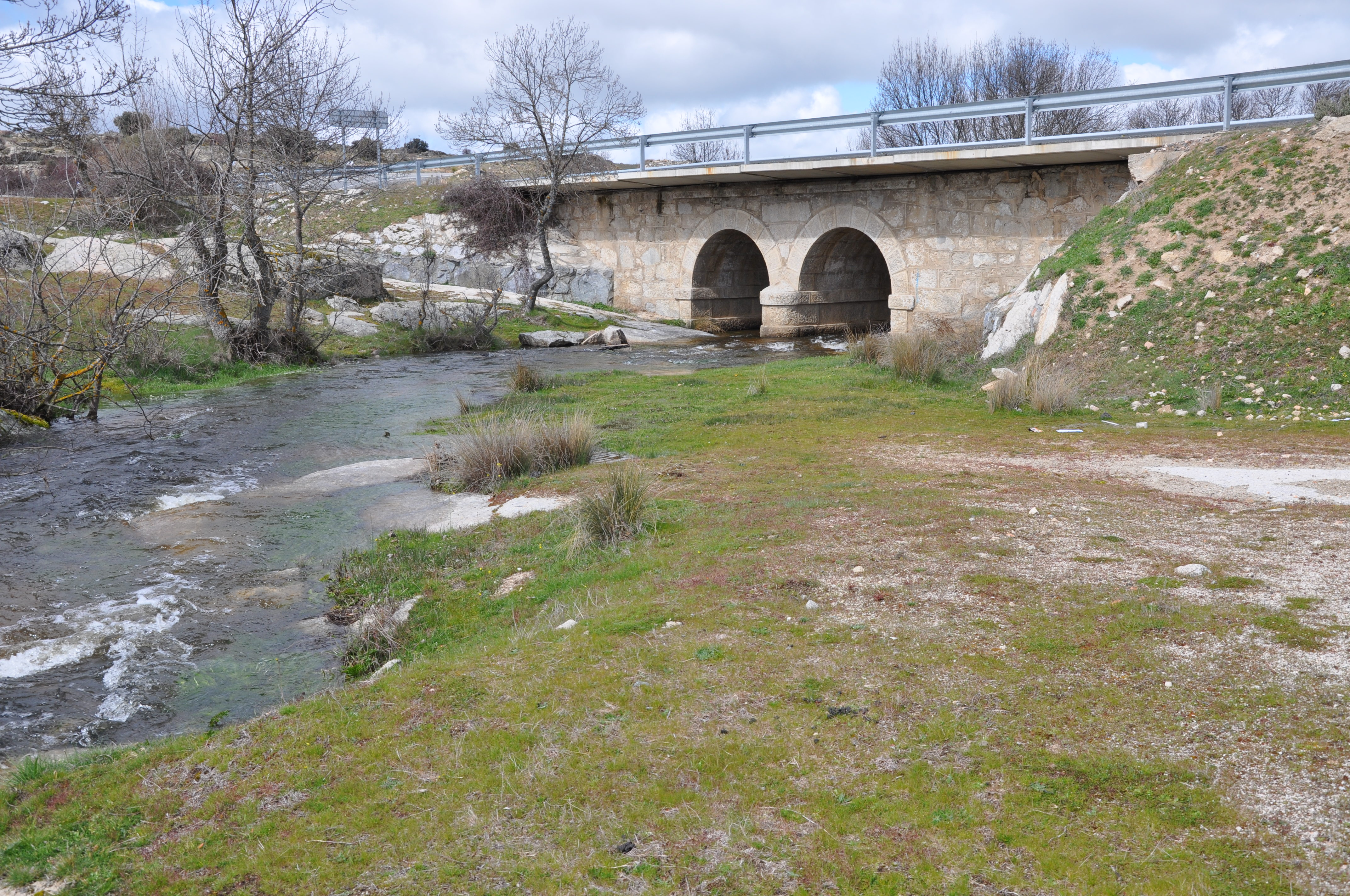 Río Margañán en Cabezas del Villar, AV, España